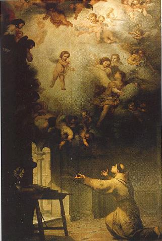 Esta obra, que preside el retablo de la capilla de San Antonio de la catedral de Sevilla, (España), fue pintada en 1656 por el célebre pintor Bartolomé Esteban Murillo.